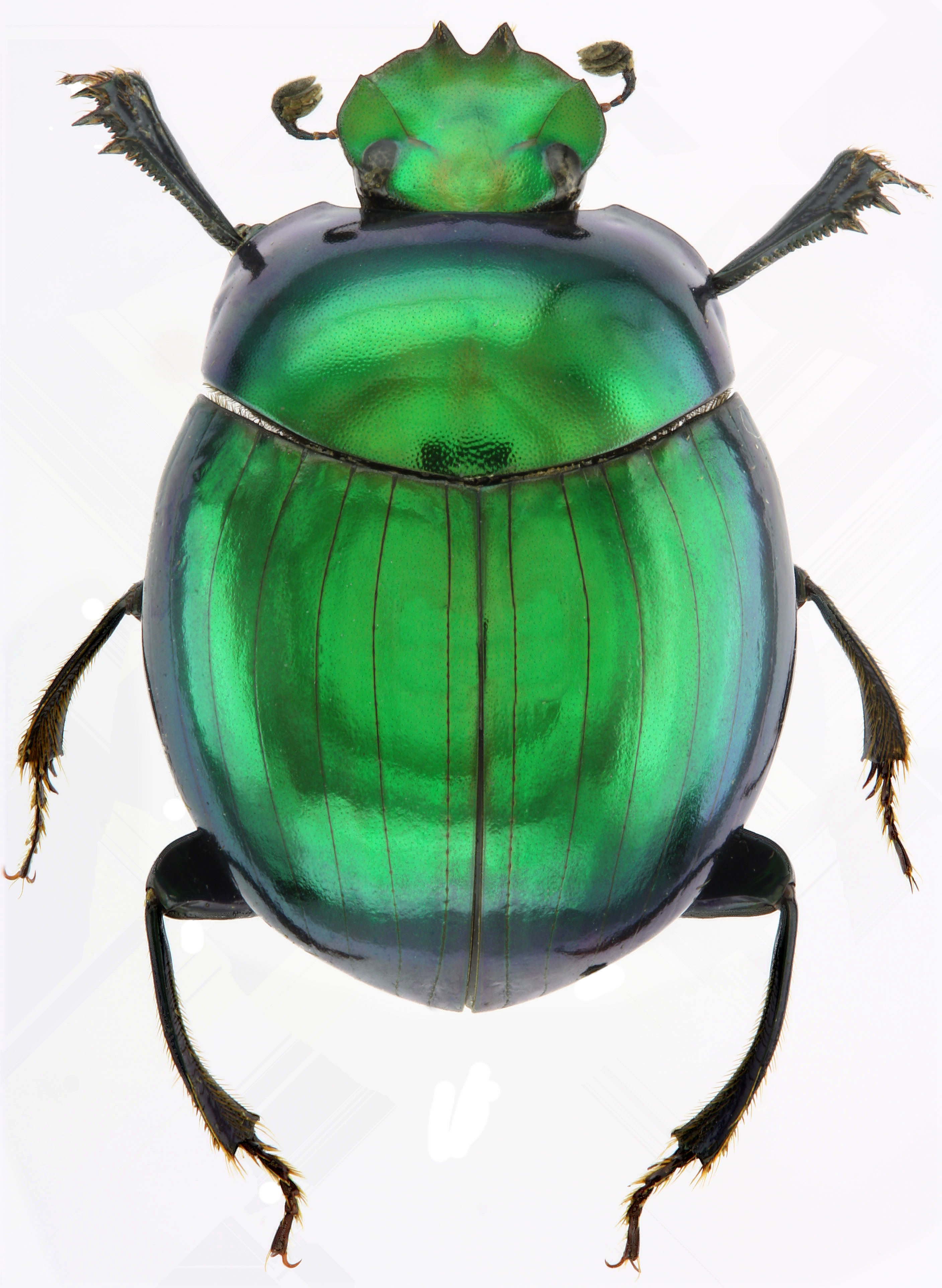 Photographie d'une des plus belles espèces du Genre Epilissus (Coleoptera: Canthonidae) provenant de Madagascar et représentant la famille de prédilection de Renaud Paulian.